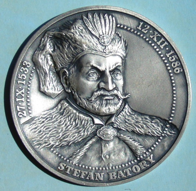 Medal Stefan Batory (awers)